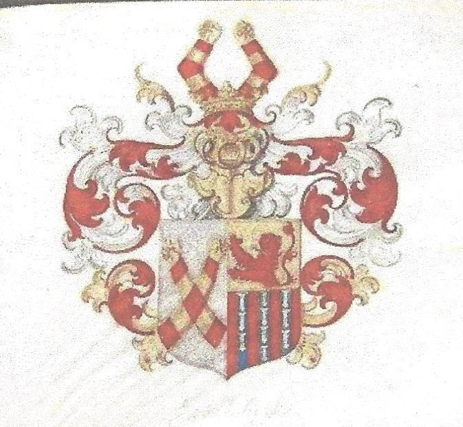 Wapen Joost Vijgh (1600-1666) en Anna de Cock van Opijnen (overl 1669)